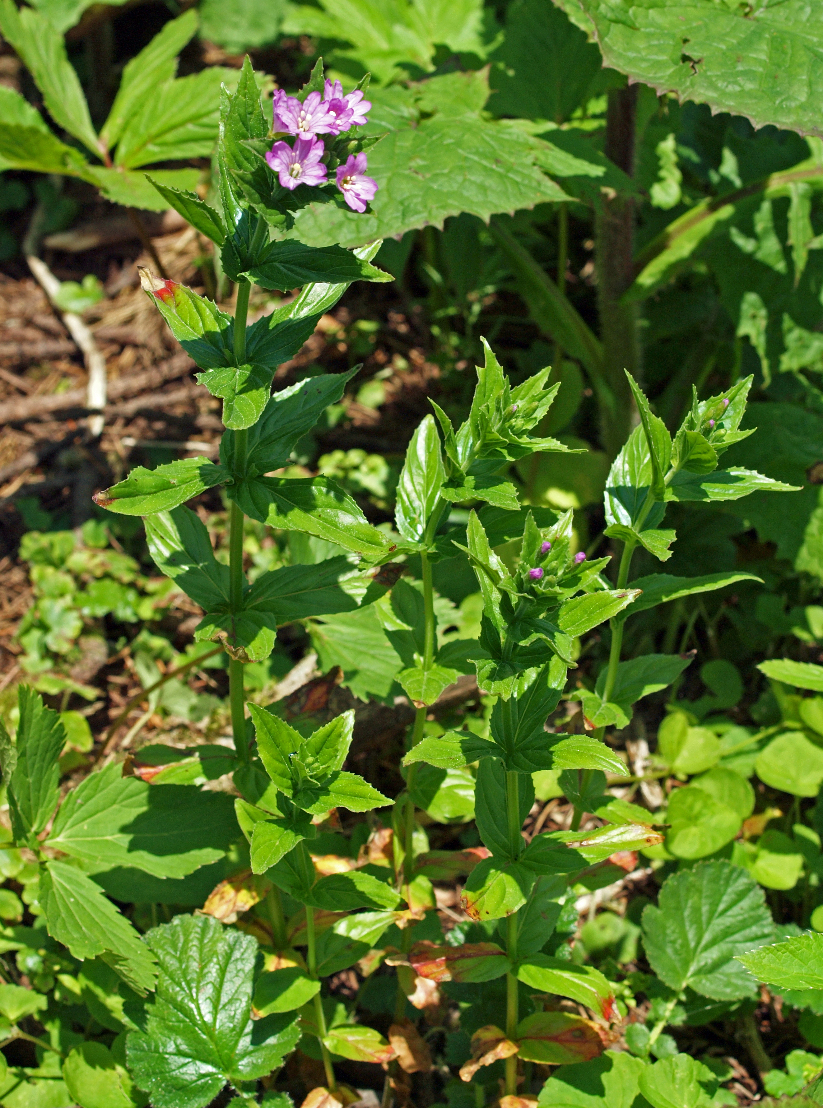 Epilobium alpestre, Austria, Styria, Aflenzer Buergeralm about 1750m